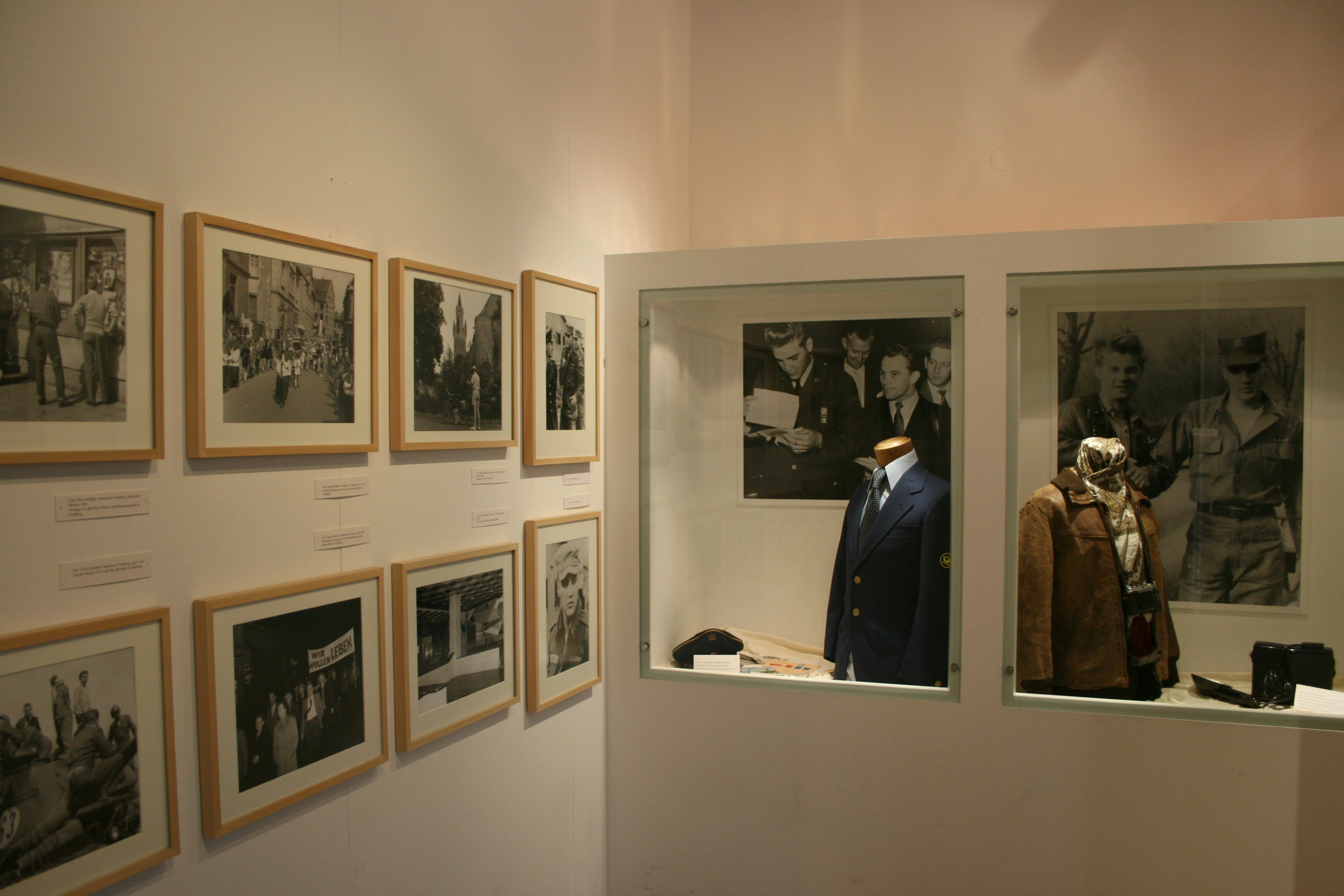 Wetteraumuseum Friedberg. Blick in die Elvis-Ausstellung. Mit freundlicher Genehmigung des Museums.